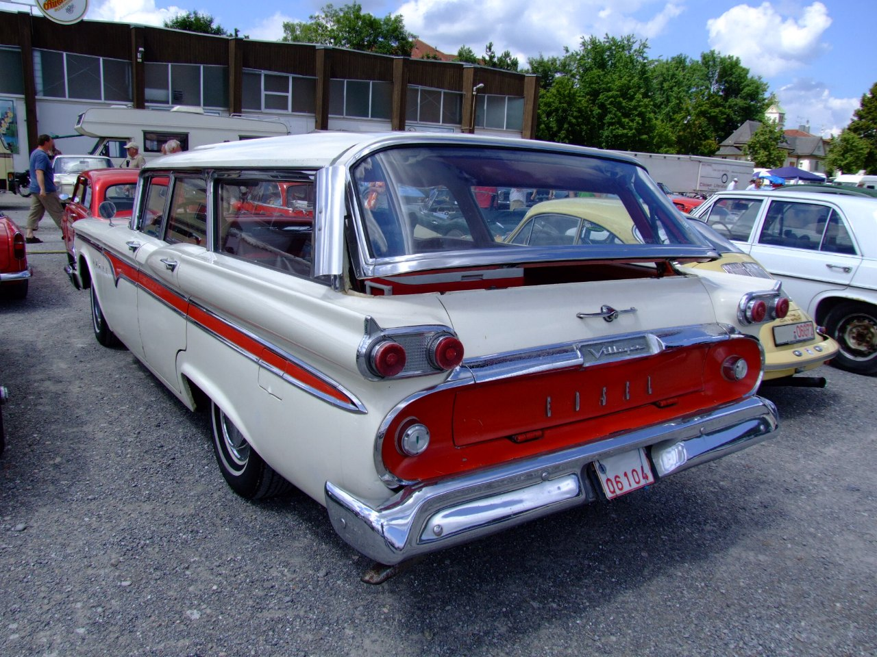 Quelle: selbst fotografiert, 07/2006 Fotograf: Späth Chr.